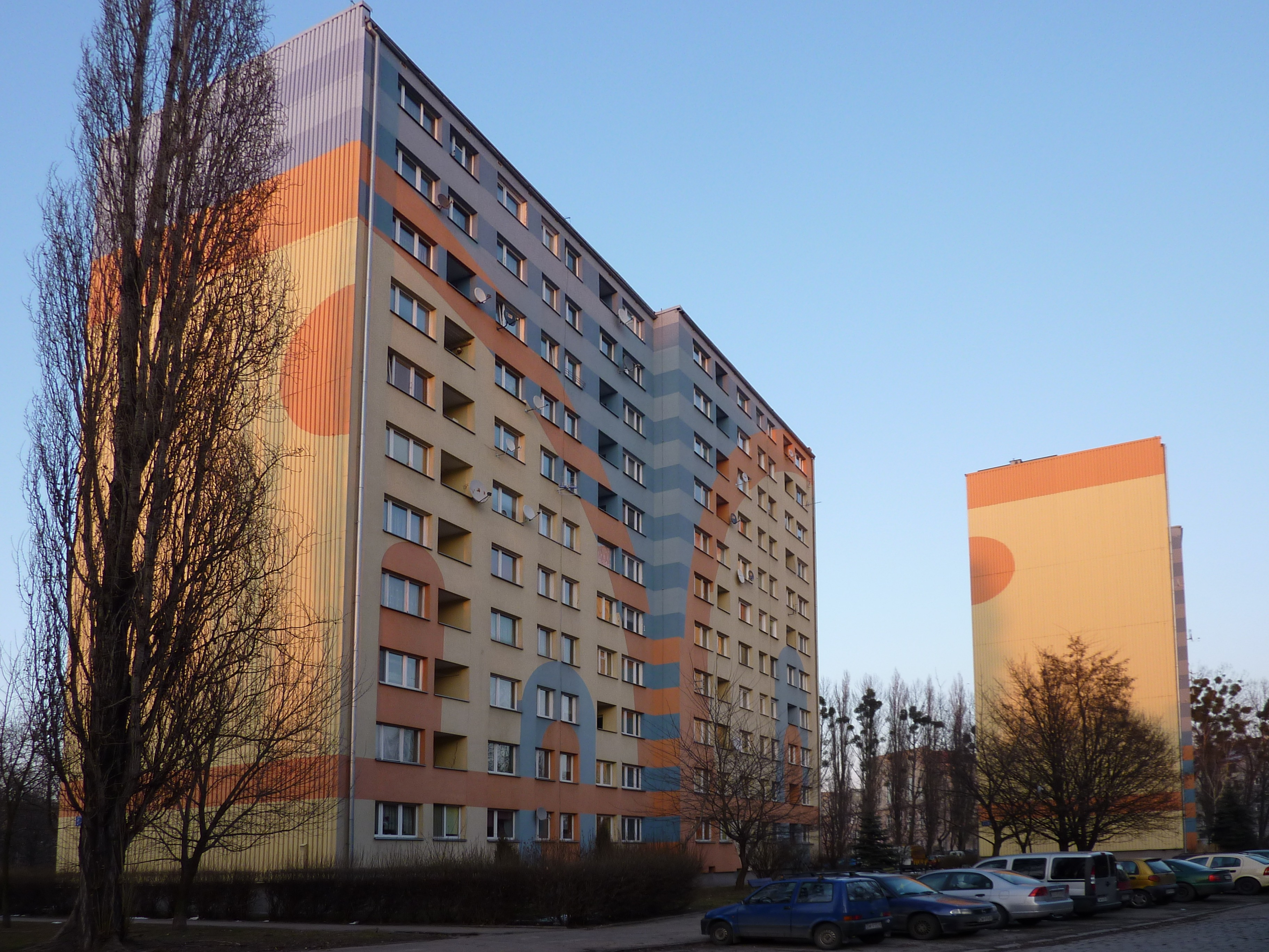 Bloki przy ul. Lubuskiej 5-7 (bliższy) oraz 1-3 (dalszy) widoczne ze skrzyżowania Lubuskiej ze Zaporoską